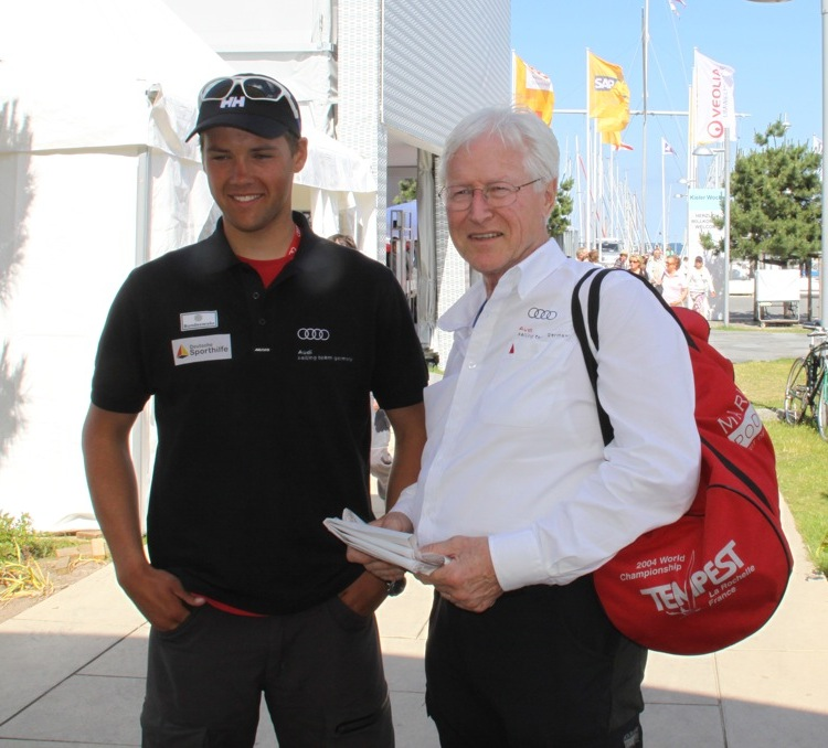 Philipp Buhl (links) mit DSV-Präsident Rolf Bähr